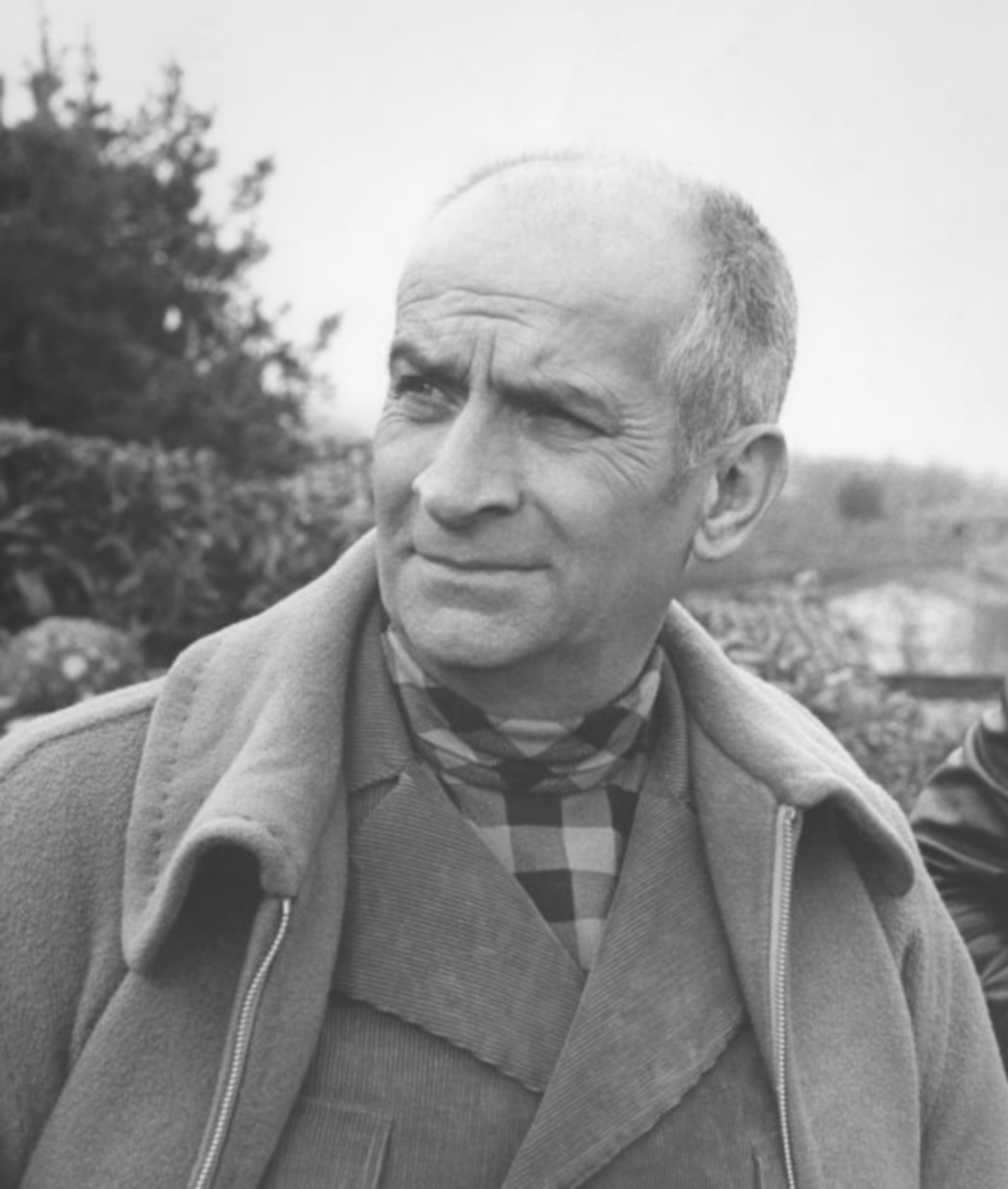 L'acteur français Louis de Funès lors du tournage du film L'Homme orchestre, dans un parc de Bassano Romano, en Italie, en mars 1970.